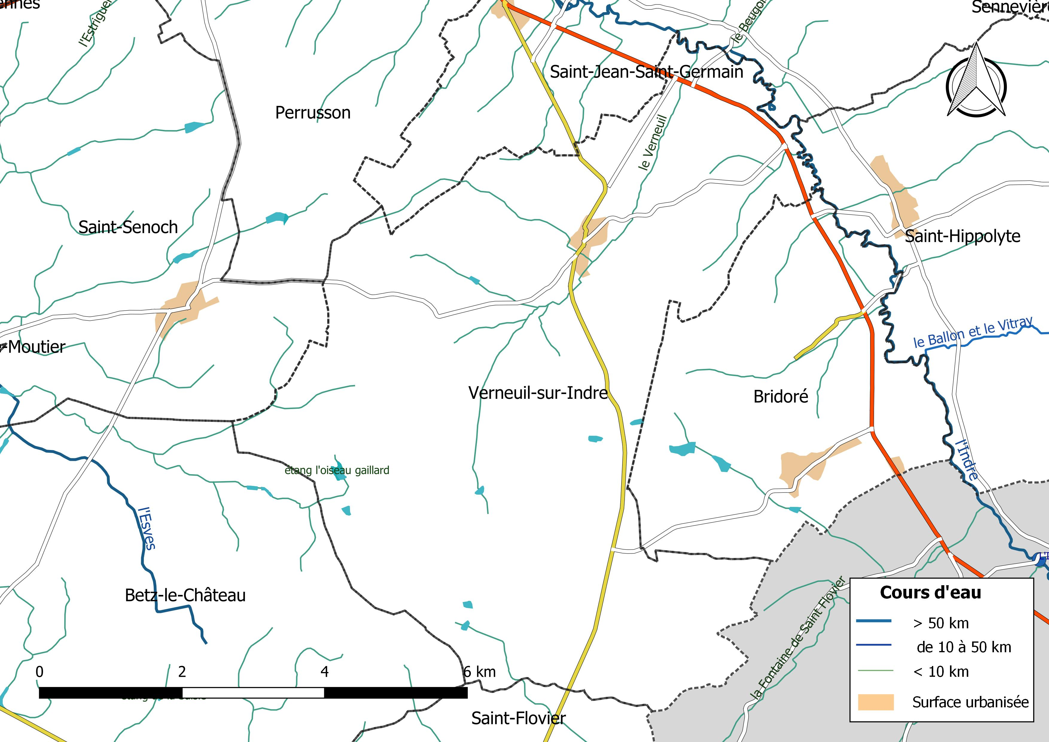 Carte du réseau hydrographique de la commune de Verneuil-sur-Indre (France).